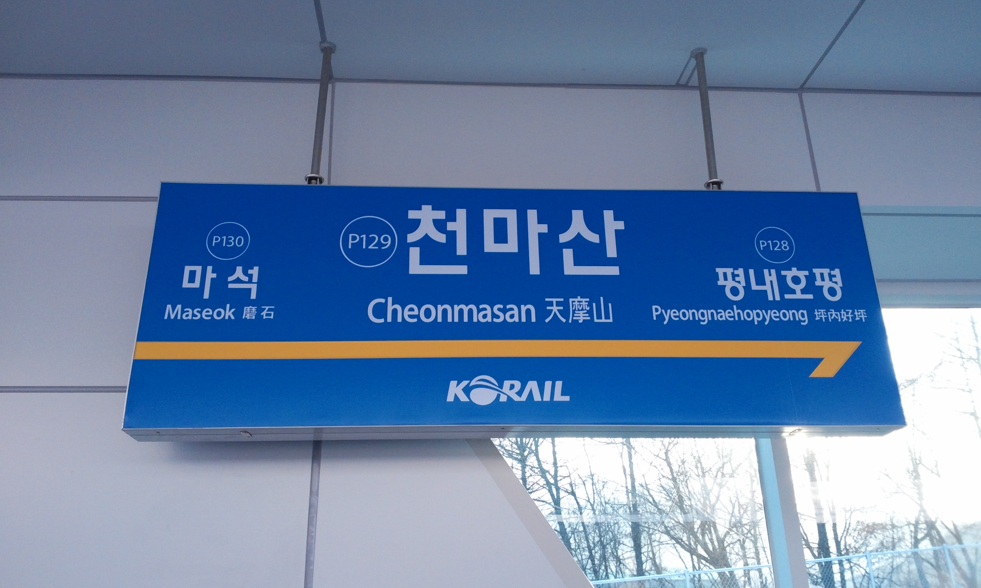 상봉 방면 역명판